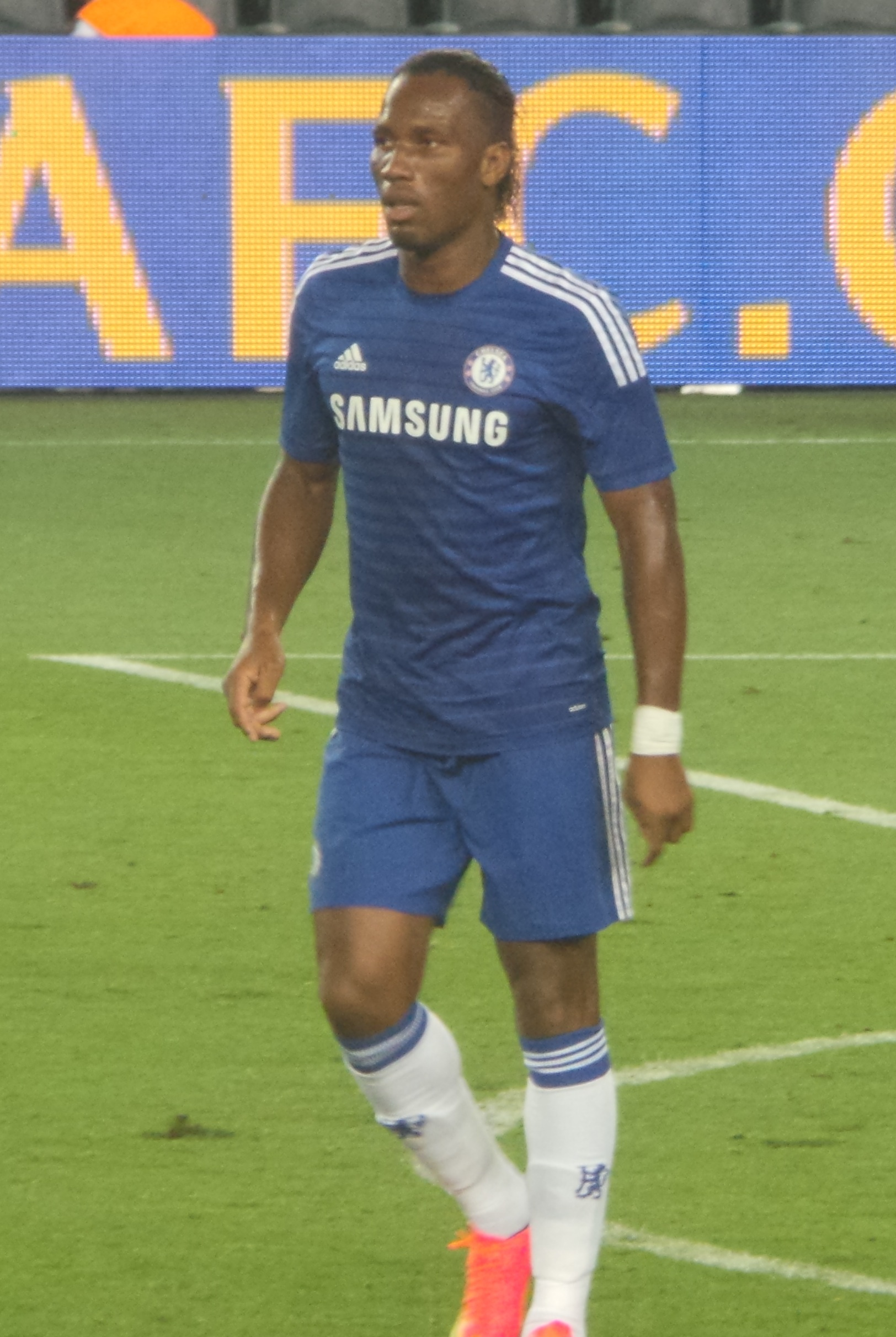 Drogba Chelsea ile 2.döneminde SOMA turnuvasında